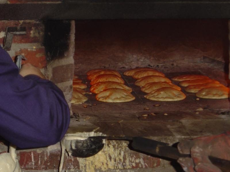 Geutelingen In Elst